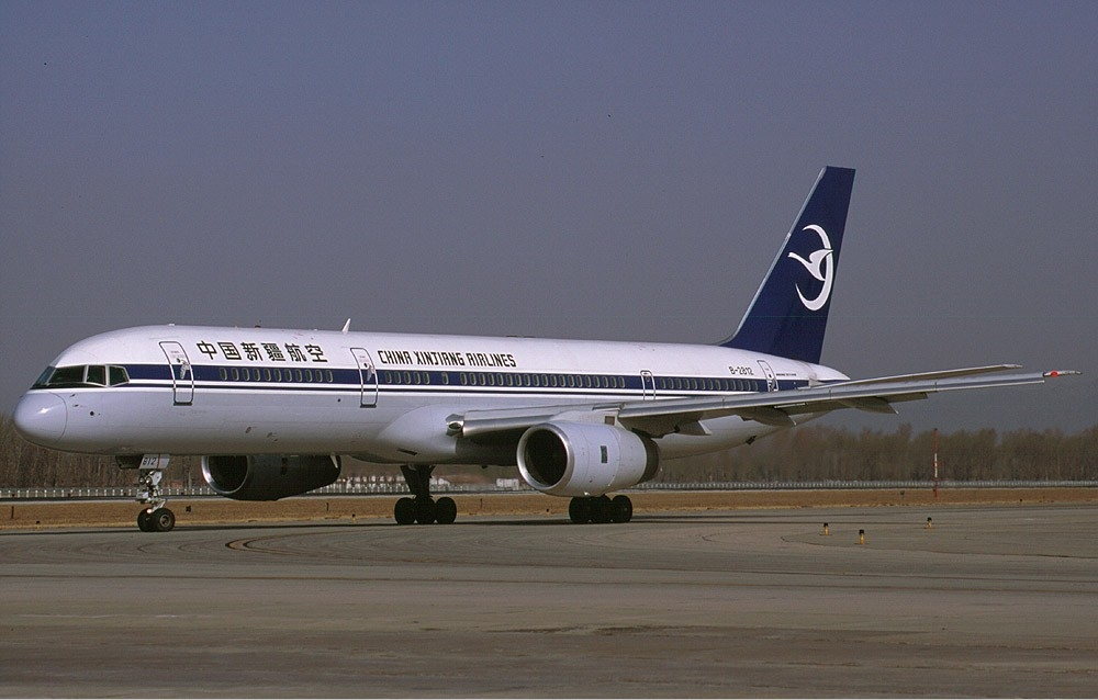 China Xinjiang Airlines Boeing 757-200